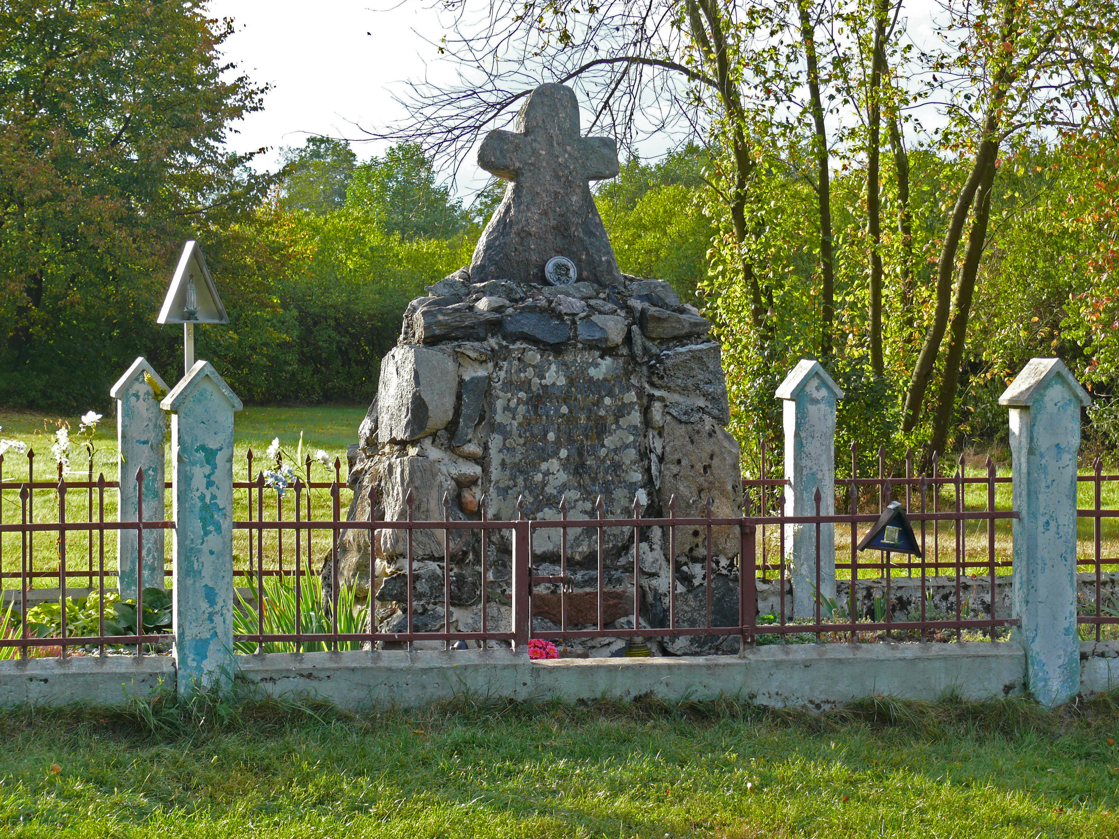 Cmentarz unickich męczenników podlaskich (1 poł. XIX)(fot2) - Pratulin, gmina Rokitno, powiat bialski, woj. lubelskie (Zabytek nr.A/762 z 14.05.1998) 05.1998.